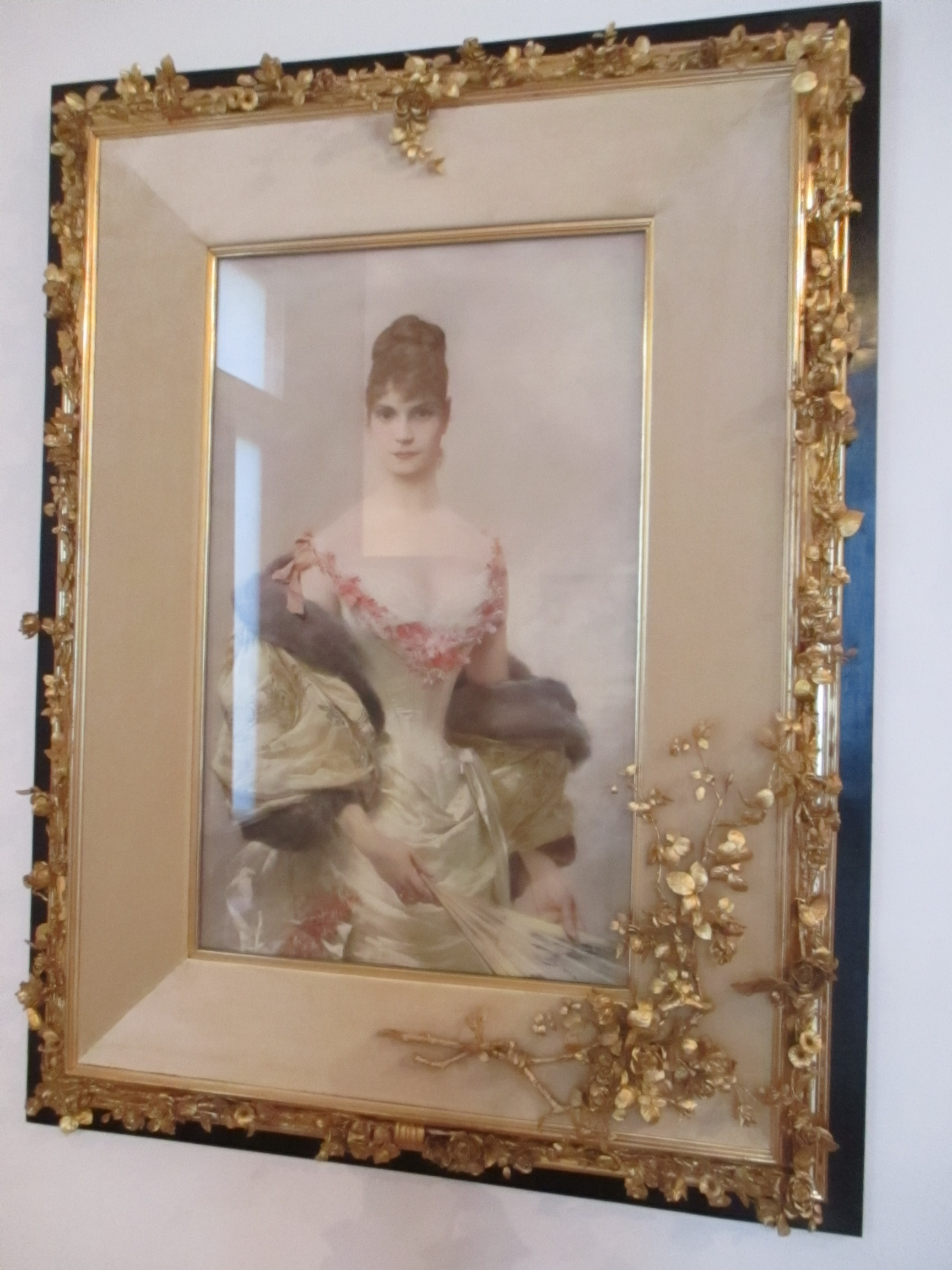 Princess Isabella of Bavaria (Isabella Maria Elisabeth; 31 August 1863 – 26 February 1924). pastel portrait by Bruno Piglheim (1848-94). Hanging at Hermesvilla in Vienna (part of Wienmuseum). Photo taken on November 1st 2015.